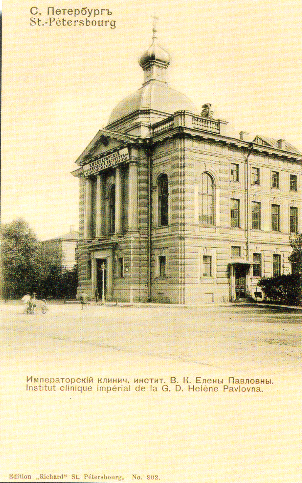 Hospital in St-Petersburg